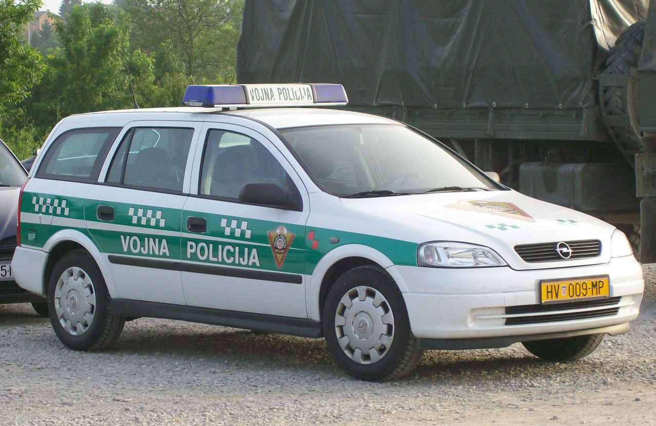 Automobil Vojne policije Hrvatske vojske